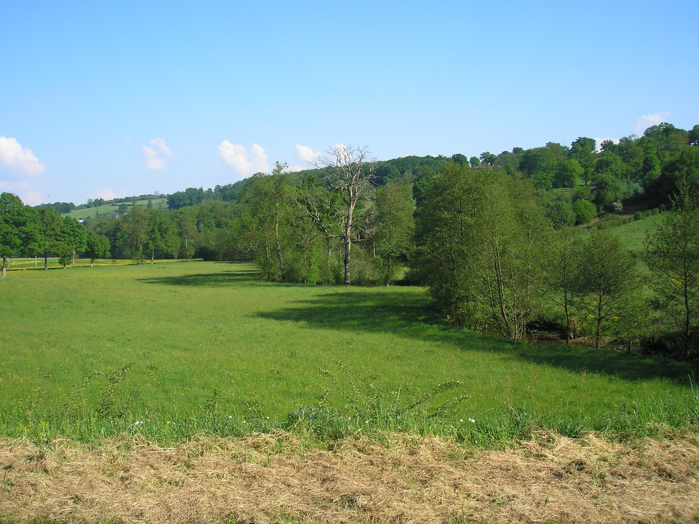 La Druance, rivière en limite entre les communes de Lénault, à gauche, et Saint-Vigor-des-Mézerets, à droite (Normandie, France).